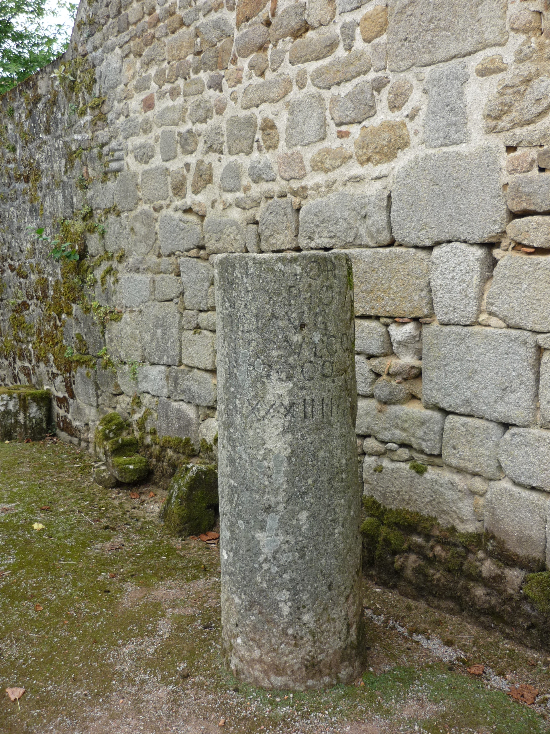 Borne leugaire de l'an 243 après JC située sur la commune de Moutier d'Ahun dans le département de la Creuse. Une inscription est lisible : "CLL XXXIIII", soit "Cité des Lémovices (Limoges), 34 lieues."